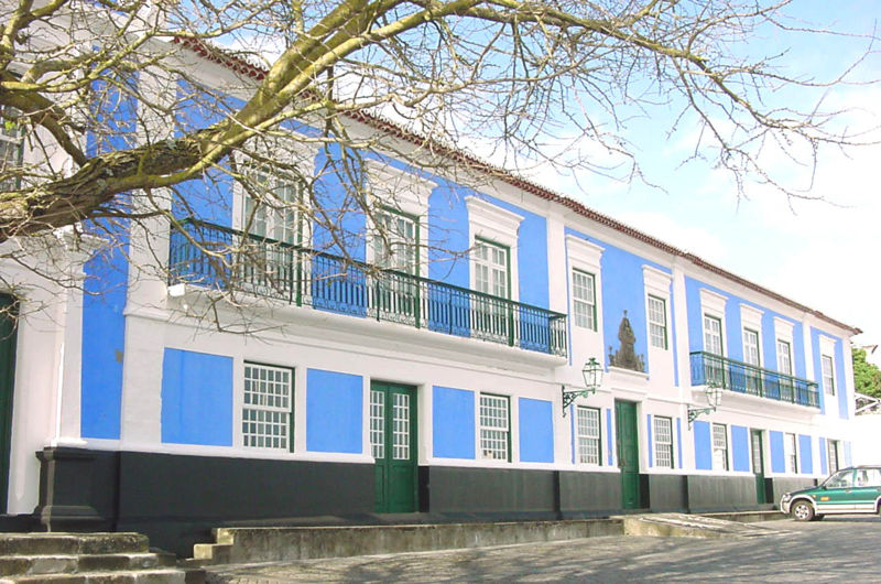 Solar da Madre de Deus, Angra do Heroísmo, Ilha Terceira, Açores: fachada principal.